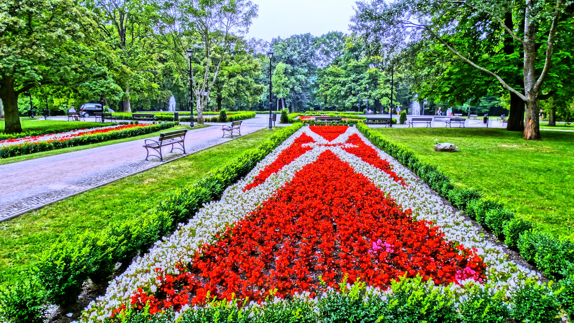 Świnoujście, park zdrojowy, 1827, 1939, po 1945